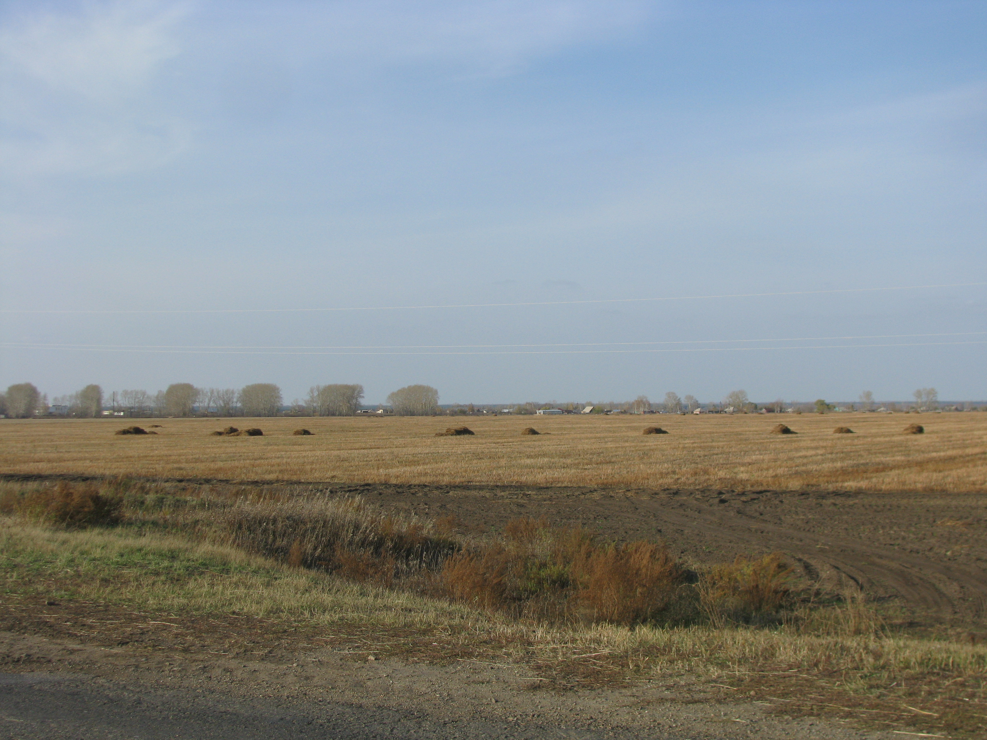 Село Боровское в октябре 2011г. Вид с юга.